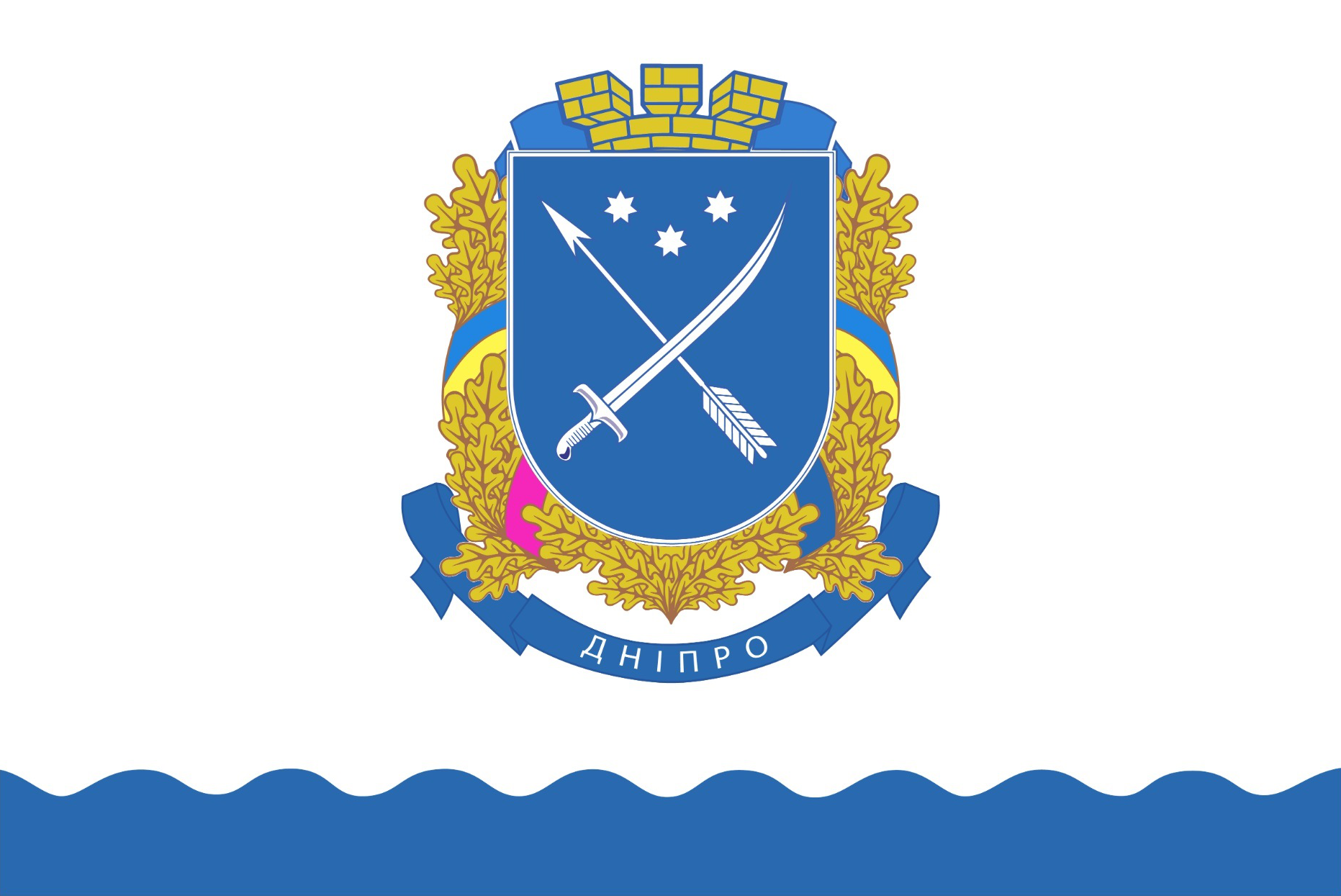 Прапор Дніпра